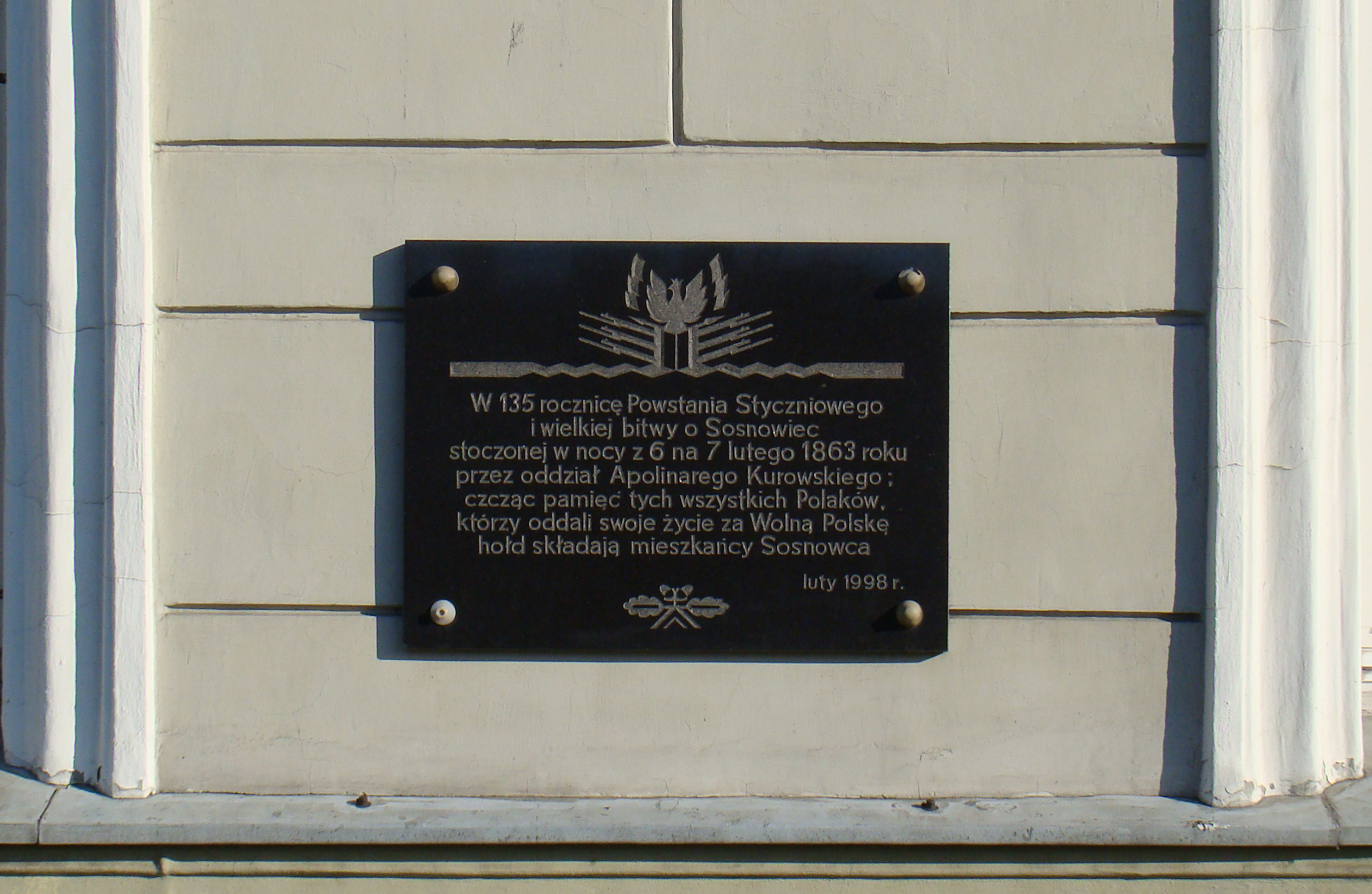 Sosnowiec, budynek dworca głównego, 1859, 1915